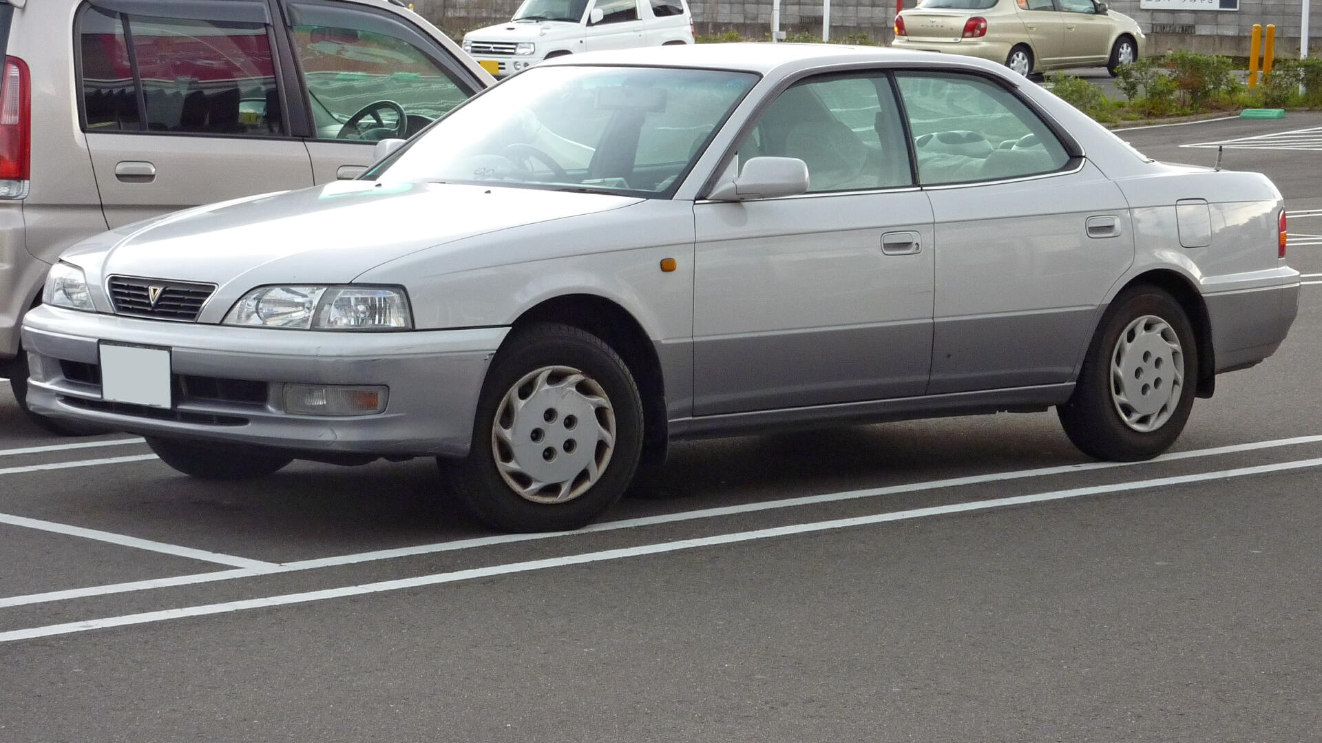 トヨタ・ビスタ（V40型・後期型）